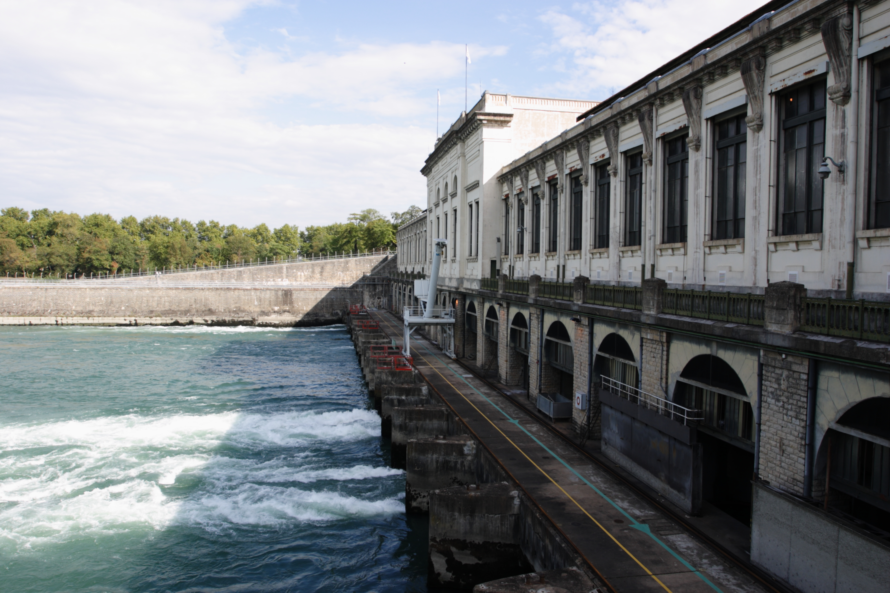 Façade aval de la Centrale hydroélectrique de Cusset (Villeurbanne, Rhône, France).